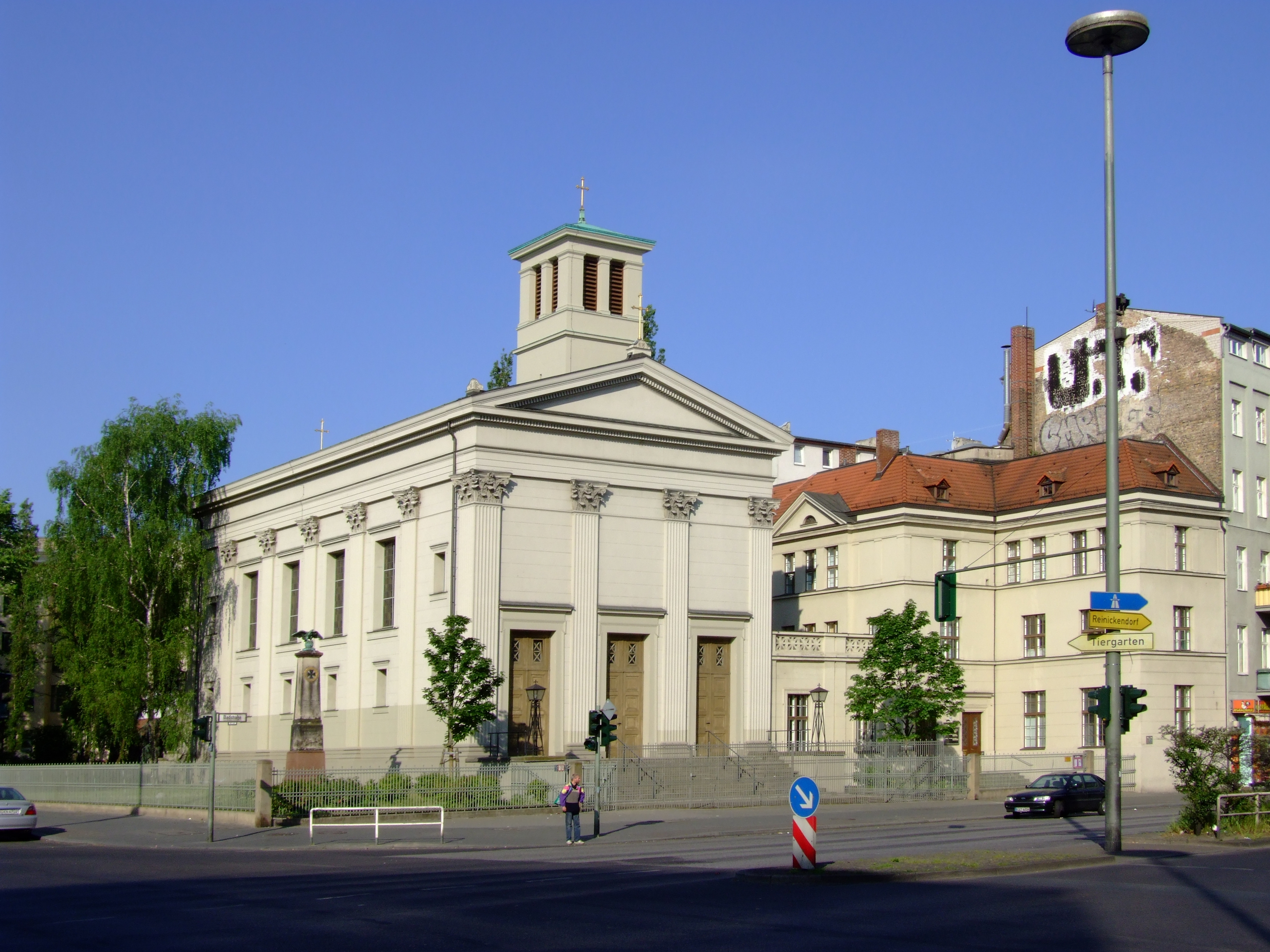 St.Paulskirche in Berlin-Mitte, OT Gesundbrunnen (Badstr./Pankstr.)